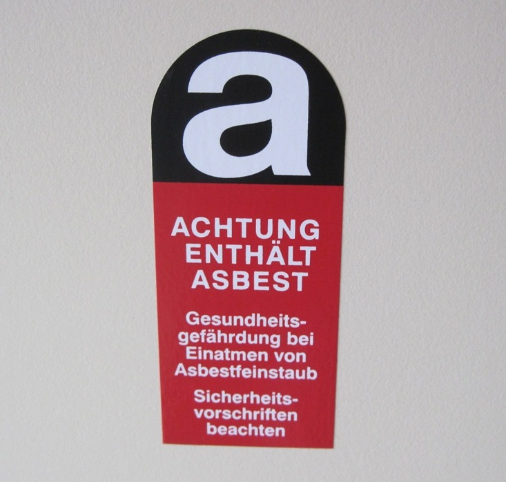 StandardisierterTRGS 519, Anlage 2 a: Kennzeichnung von Arbeitsbereichen Aufkleber der auf Behältnisse, die Asbest oder asbesthaltige Stoffe enthalten, außen als Warnhinweis gut sichtbar angebracht werden muß.